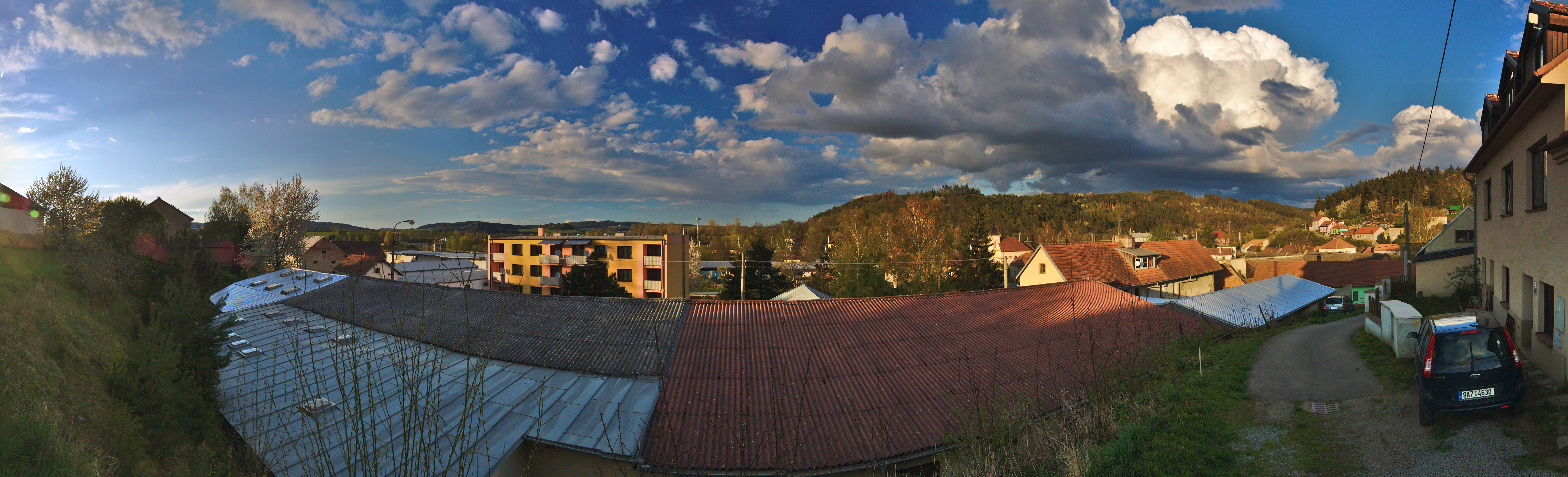 Panoramatický pohled na vesnici, Skalice nad Svitavou, okres Blansko